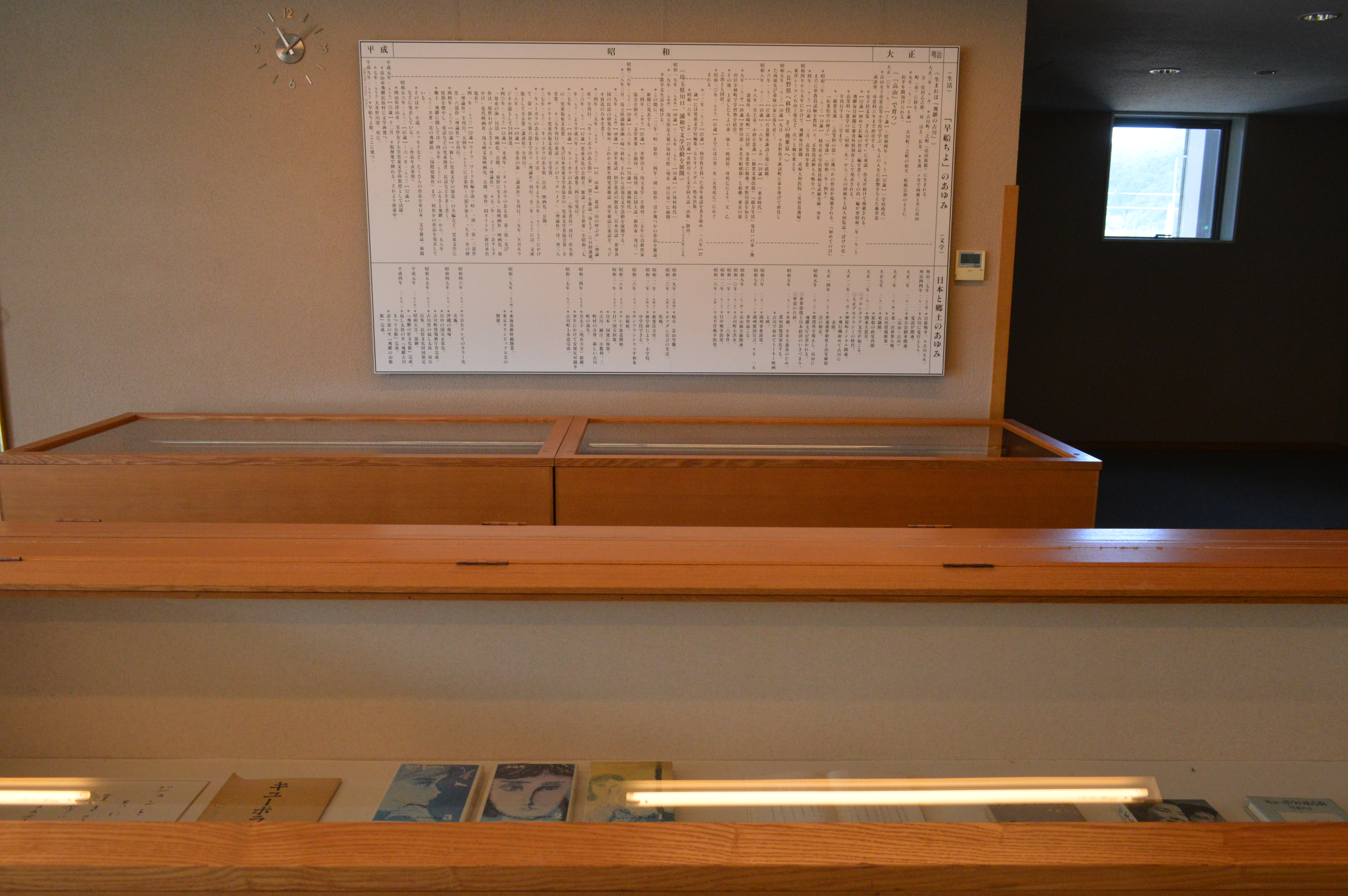 飛騨市図書館。2階の早船ちよに関する常設展示。